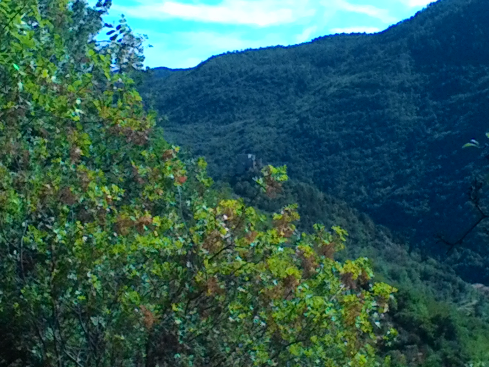 Valneva vista da osservatorio massena